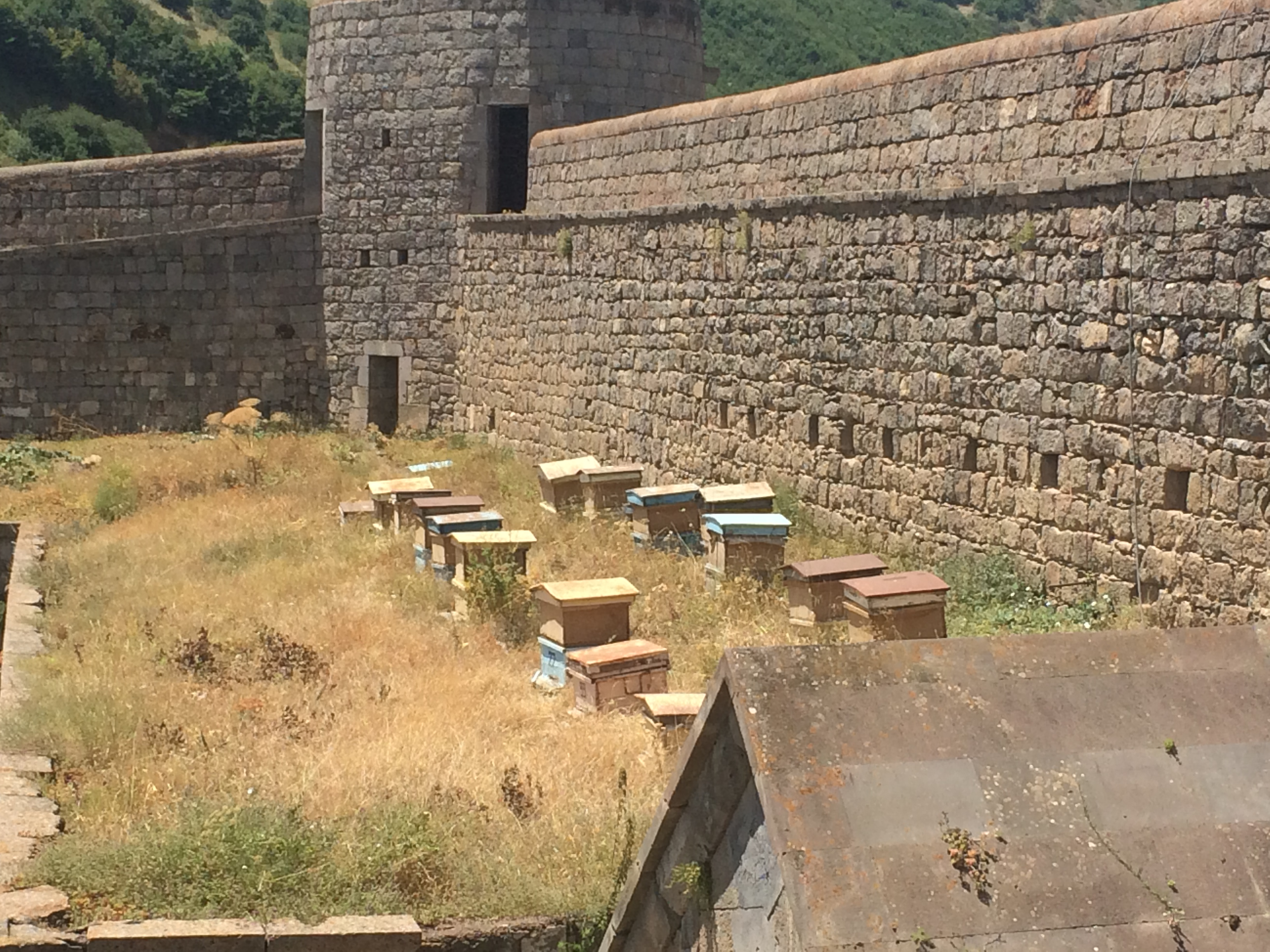 Տաթևի վանքի փետակները։